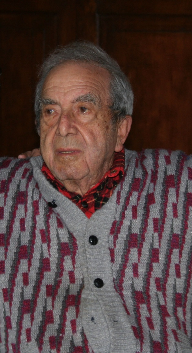 Franco Potenza